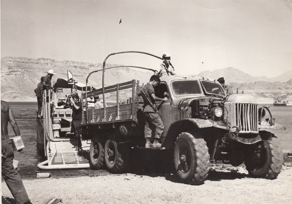 נחתת פורקת מים ודלק לחטיבה 9 בדרום מפרץ אילת